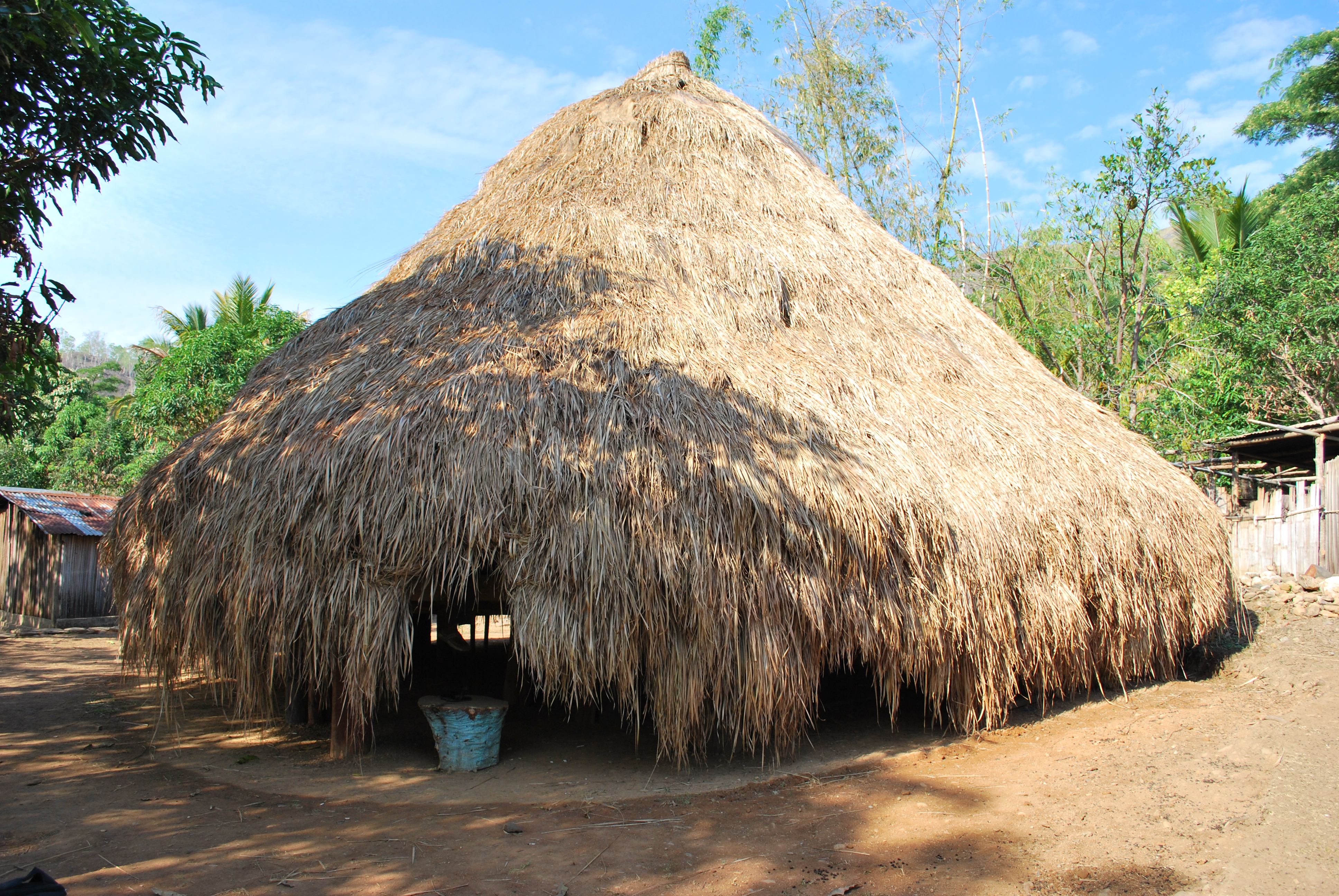 Heiliges Haus in Maununo, Suco Cassa, Subdistrikt Ainaro, Distrikt Ainaro, Osttimor